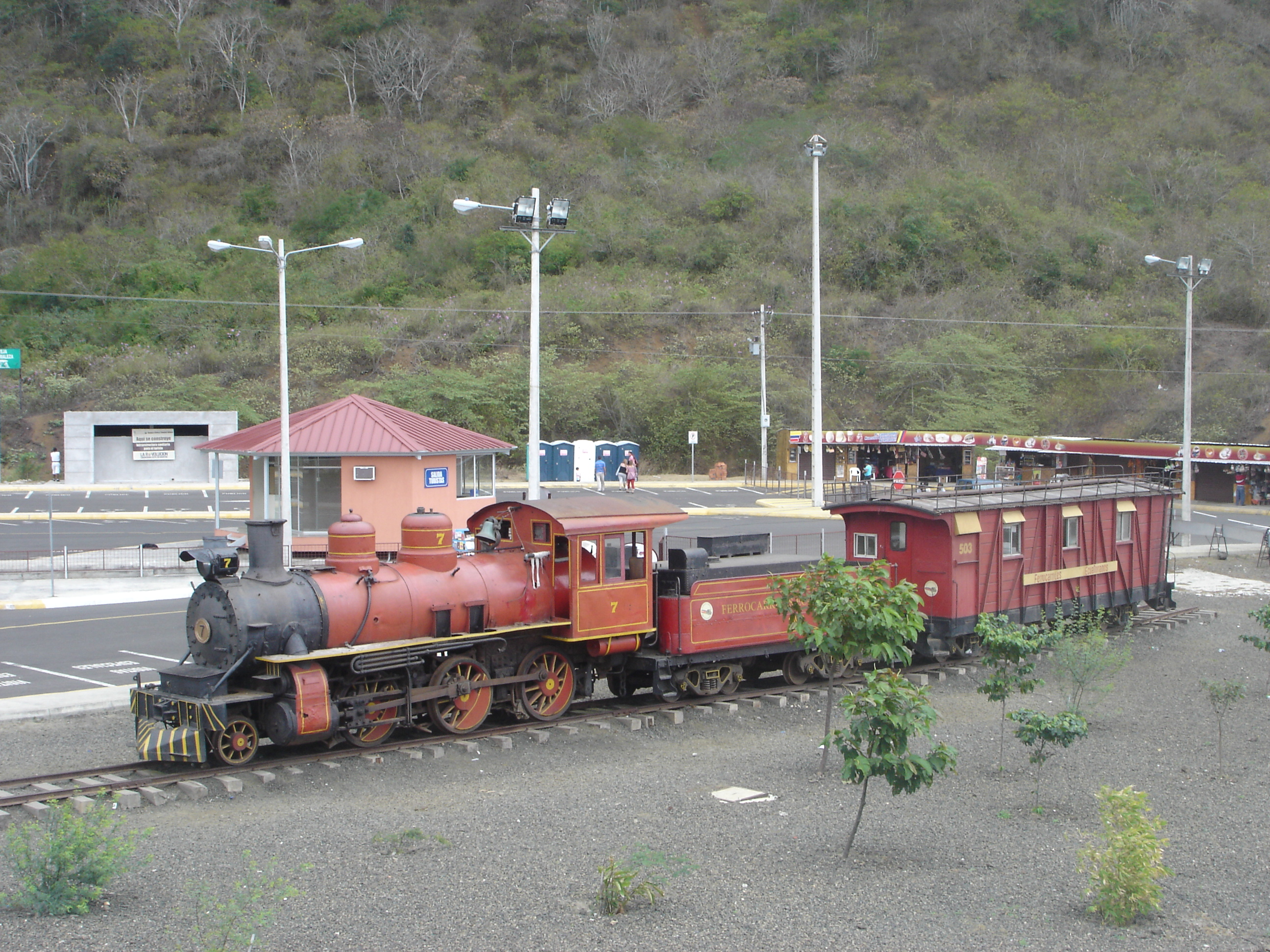 Train à vapeur de la ligne Quito-Guayaquil en exposition à Ciudad Alfaro, Montecristi.